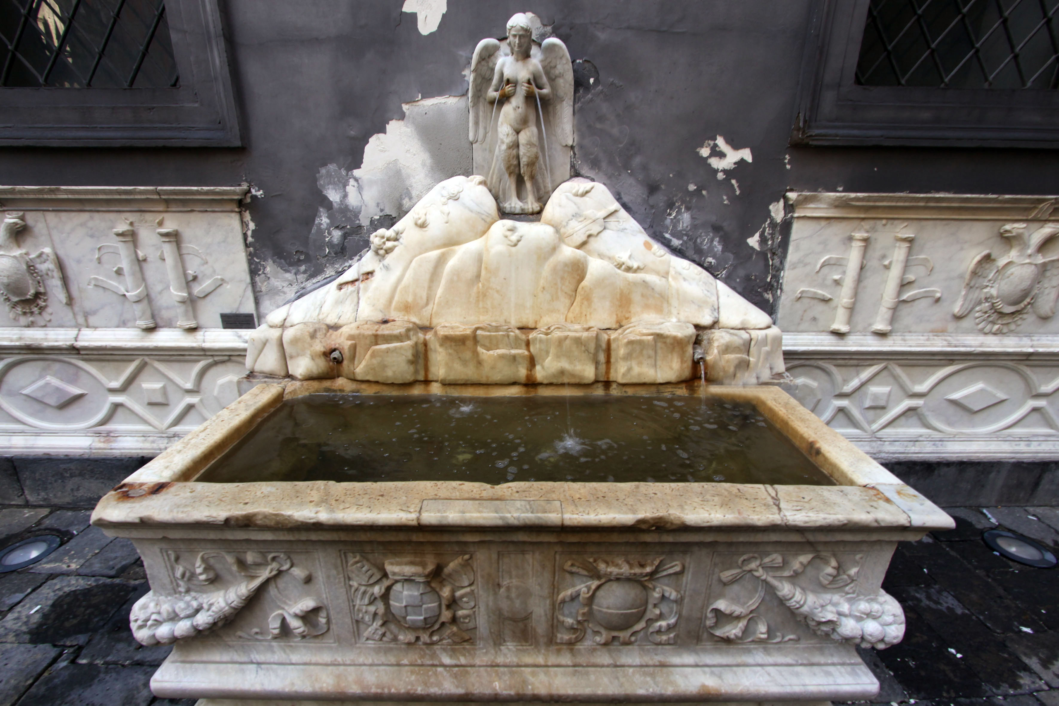 La fontana della Spinacorona (detta "delle zizze") è una delle fontane di Napoli; si erge nel centro antico, addossata alla chiesa di Santa Caterina della Spina Corona. Fu voluta da don Pedro Álvarez de Toledo su disegno di Giovanni da Nola nel XVI secolo, come attestato dalla presenza dello stemma di Carlo V. L'opera scultorea costituisce una testimonianza del passaggio dai gusti medievali alle prime forme e decorazioni barocche. Il soggetto principale è la sirena (icona mitologica di Napol]) che è in procinto di spegnere le fiamme del vulcano Vesuvio (non più integro) con l'acqua che le sgorga dai seni (il tutto è spiegato in una lapide di marmo con l'incisione Dum Vesevi Syrena Incendia Mulcet). L'originale statuetta della sirena, oggi è al Museo di San Martino, mentre come sua sostituta vi è una sua identica copia, riprodotta e scolpita da Achille d'Orsi. La ricca vasca rettangolare in marmo bianco è abbellita da altorilievi, ghirlande ed ulteriori stemmi del viceré.